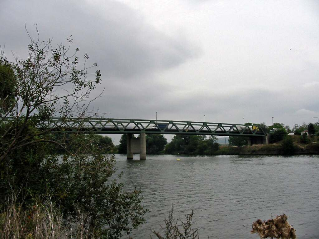 Pont de Rangiport sur la Seine entre Gargenville et Épône (Yvelines) Photo JH Mora, août 2005